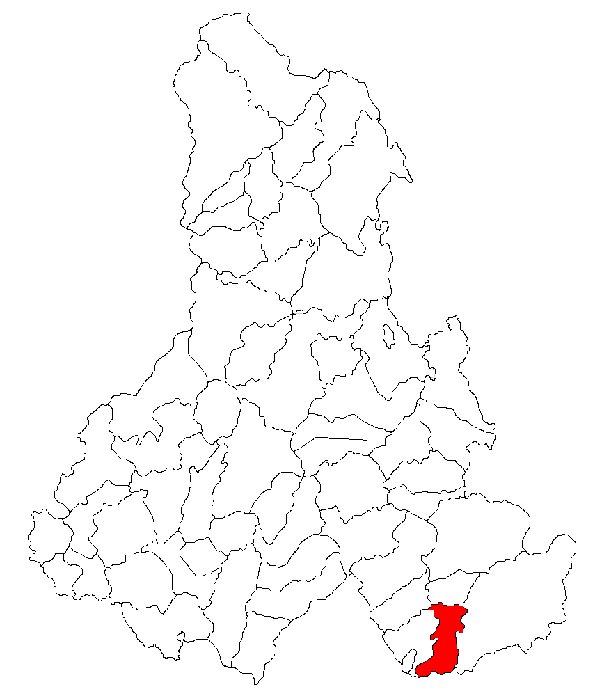 Categorie:Hărţi ale judeţului Harghita Contents 1 Licensing 2 Sursă 3 Licensing 4 Original upload log Licensing Sursă ro::Imagine:Harta_jud_Harghita.png